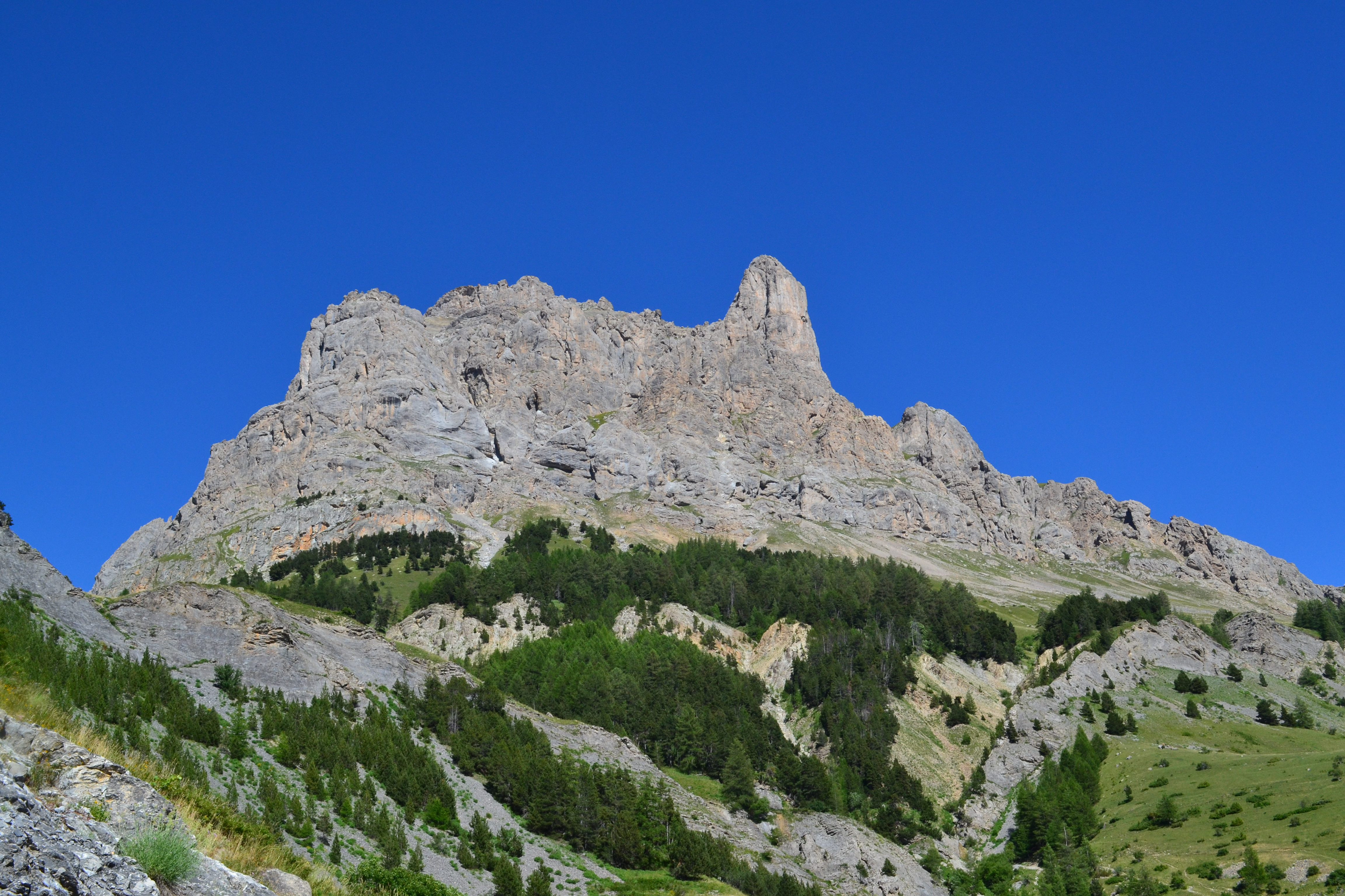 Vue générale de l'Aiguillette du Lauzet depuis le Pont de l'Alpe.